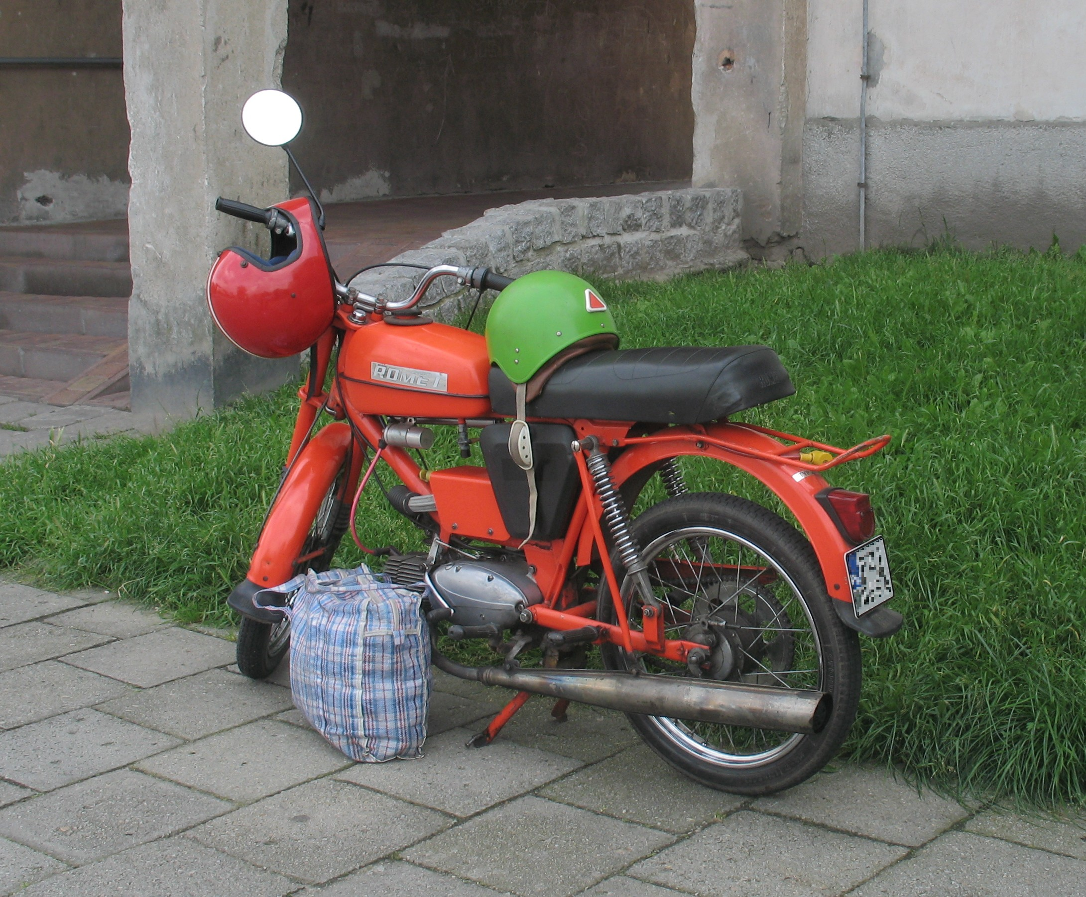 Romet Ogar 200 or 201 moped.